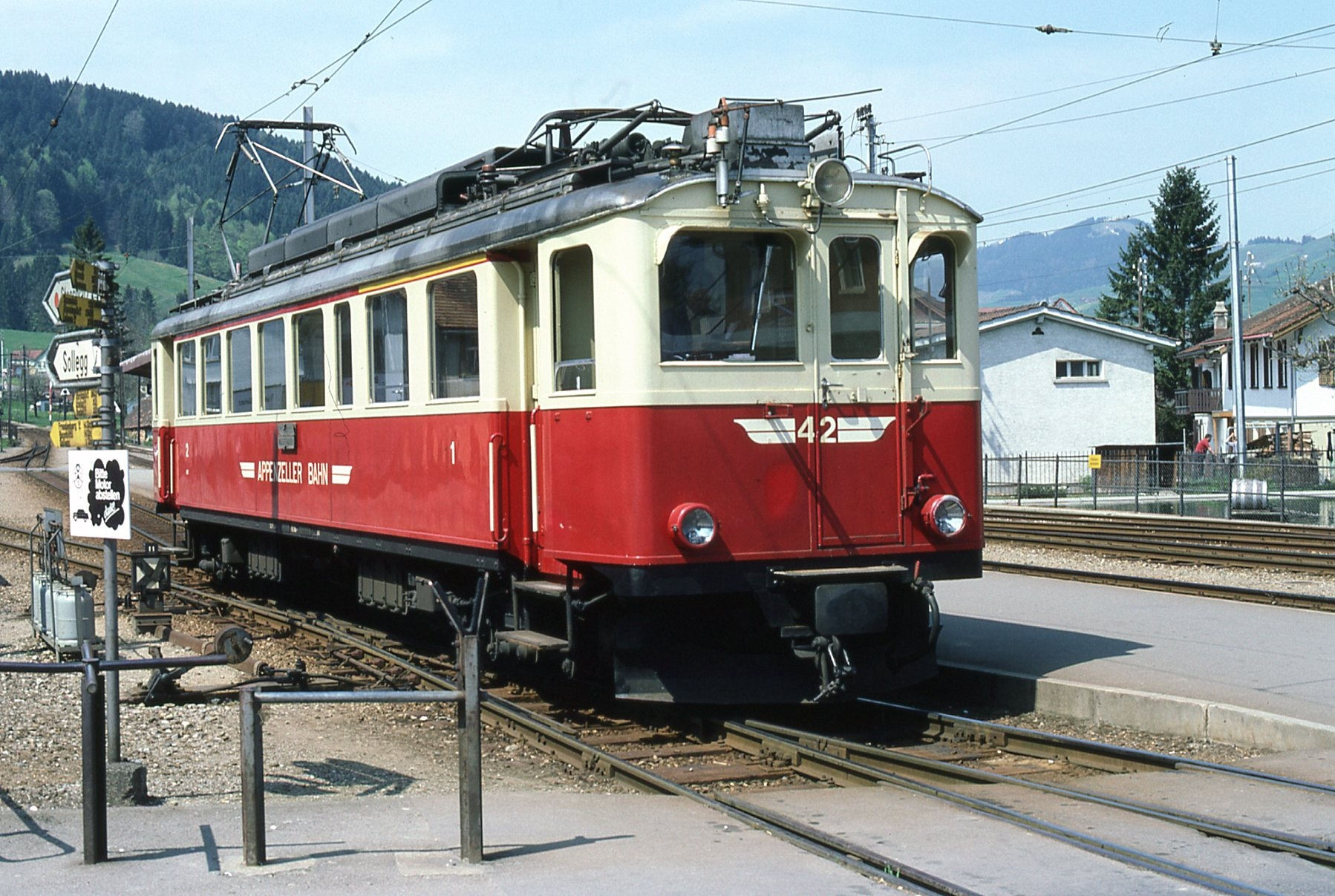 Photo. Trams aux Fils. Prise en mai 1982 La ligne de l'Appenzellerbahn à été construite entre 1875 et 1912 à voie métrique, sa longueur et de 59,7 Kilomètres. Cette compagnie est le fruit de la fusion en 1988 de deux compagnies A.B. et la S.G.A. Cette motrice à longtemps circulé sur la ligne " Bellinzone Mesocco "